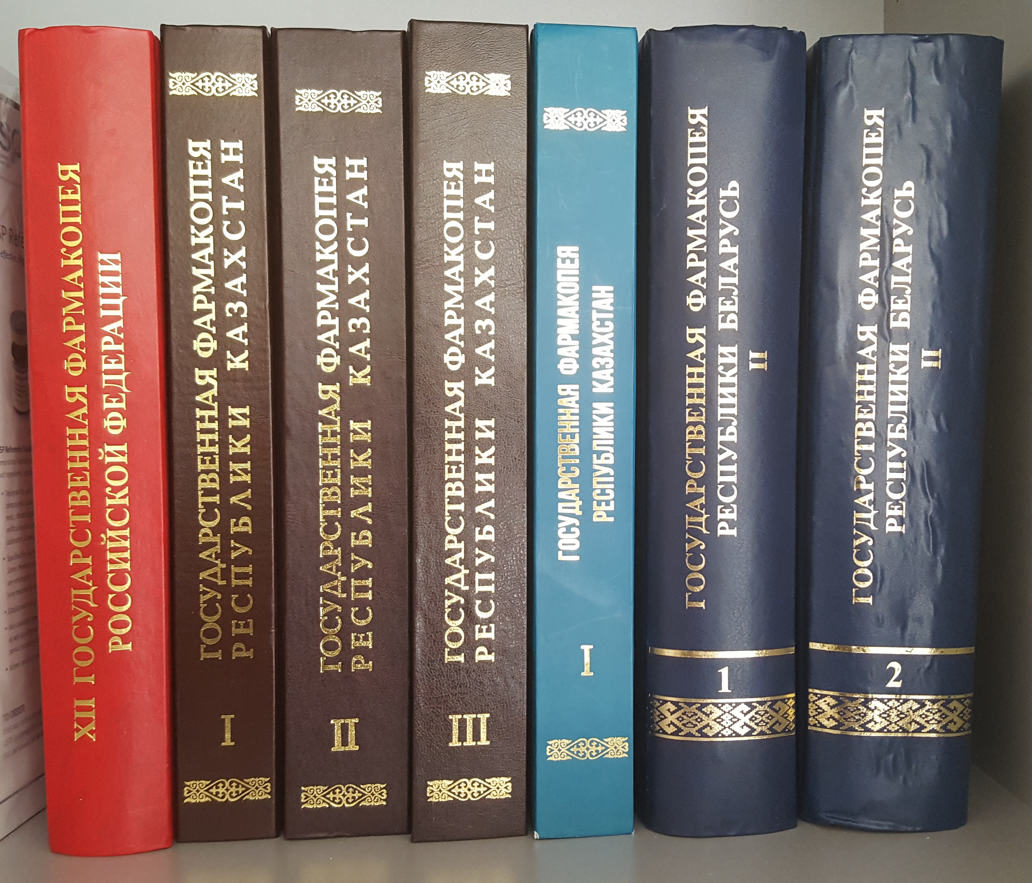 Издания фармакопей Российской Федерации, Республики Казахстан, Республики Беларусь